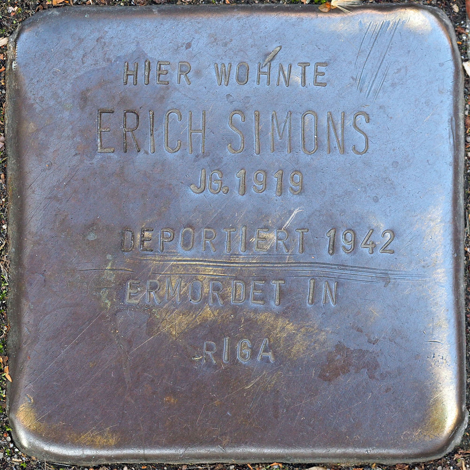 Stolperstein VIE: Simons, Erich